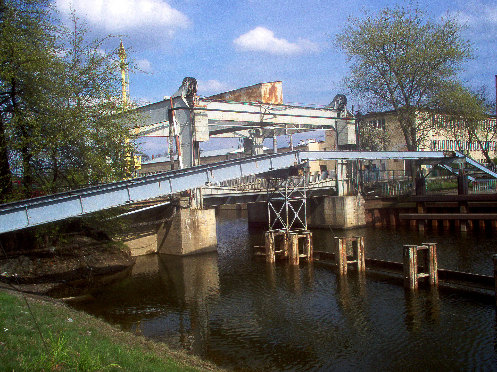 Nowa Sól - most nad kanałem portowym usytuowany w ciągu Alei Wolności oraz koło ulicy Portowej jest unikatowym w skali Polski i Europy mostem ruchomym z podnoszonym przęsłem.